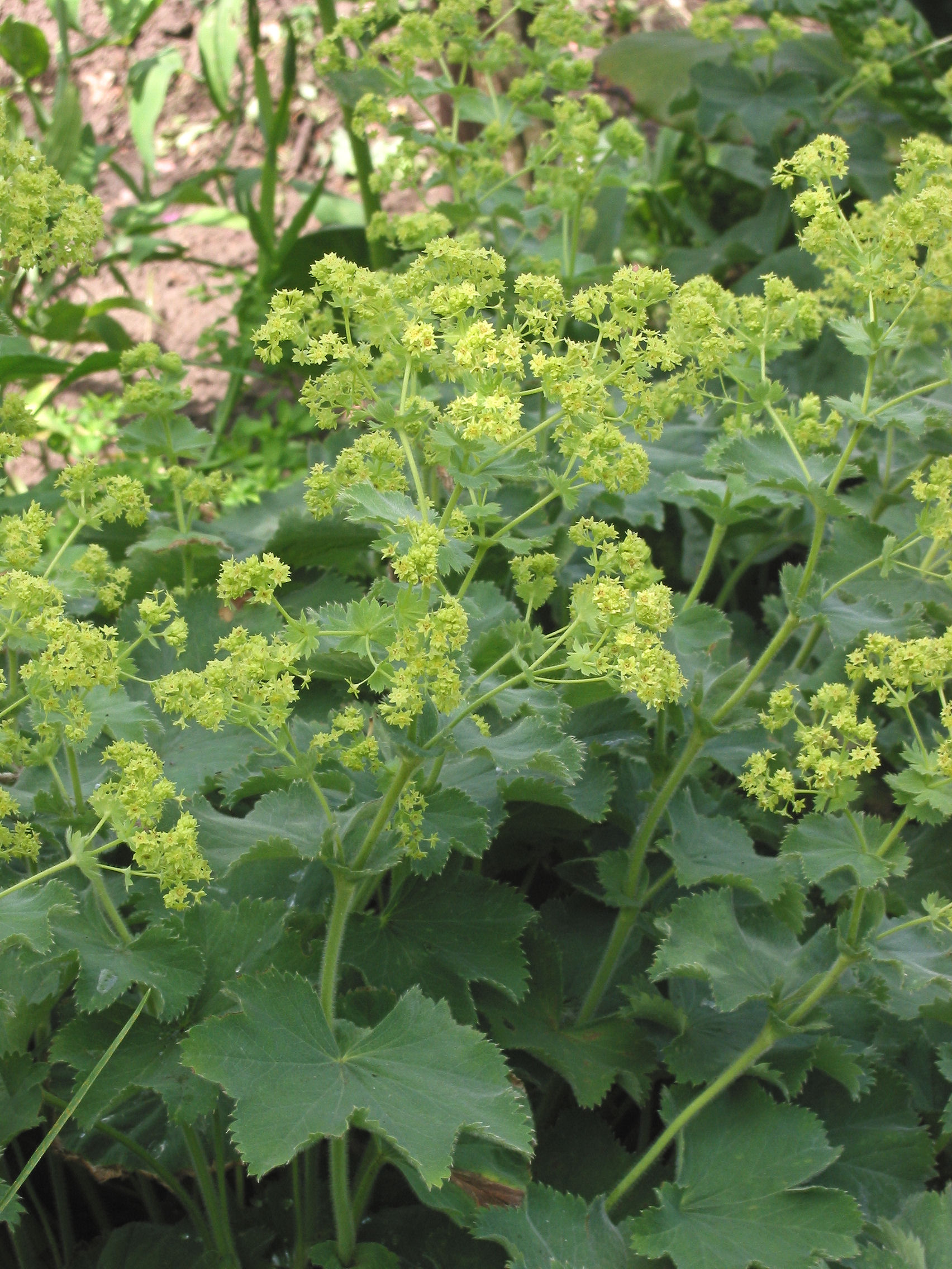 Alchemilla mollis (Fraaie vrouwenmantel bloeiwijze)